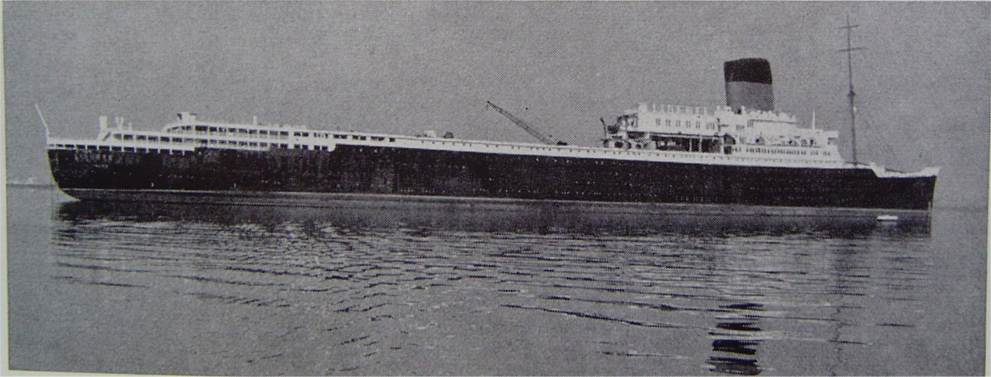 The liner Liberté during her scrapping in La Spezia in 1964.